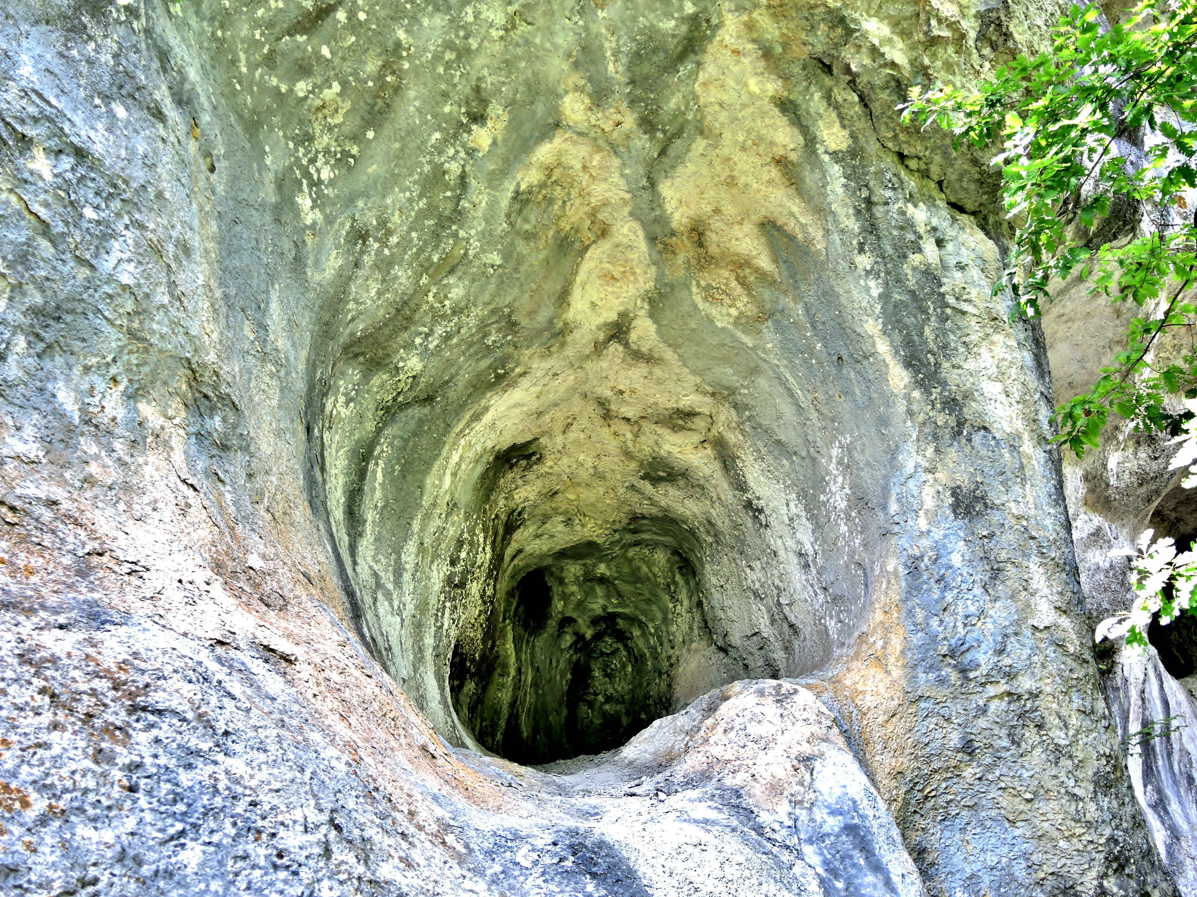 Grotte suspendue dans la falaise de Rochedane. Entre les deux grandes grottes supérieures de cette falaise. Pont-de-Roide. Doubs